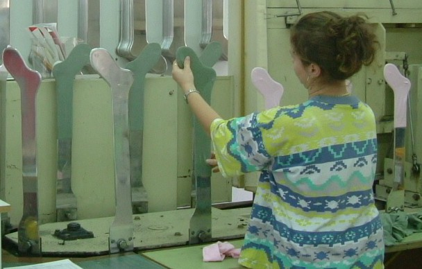 Harisnyaformázó gépnél dolgozó nő Magyarországon